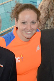 04-12-2013 Inauguración Centro Acuático, Estadio Nacional